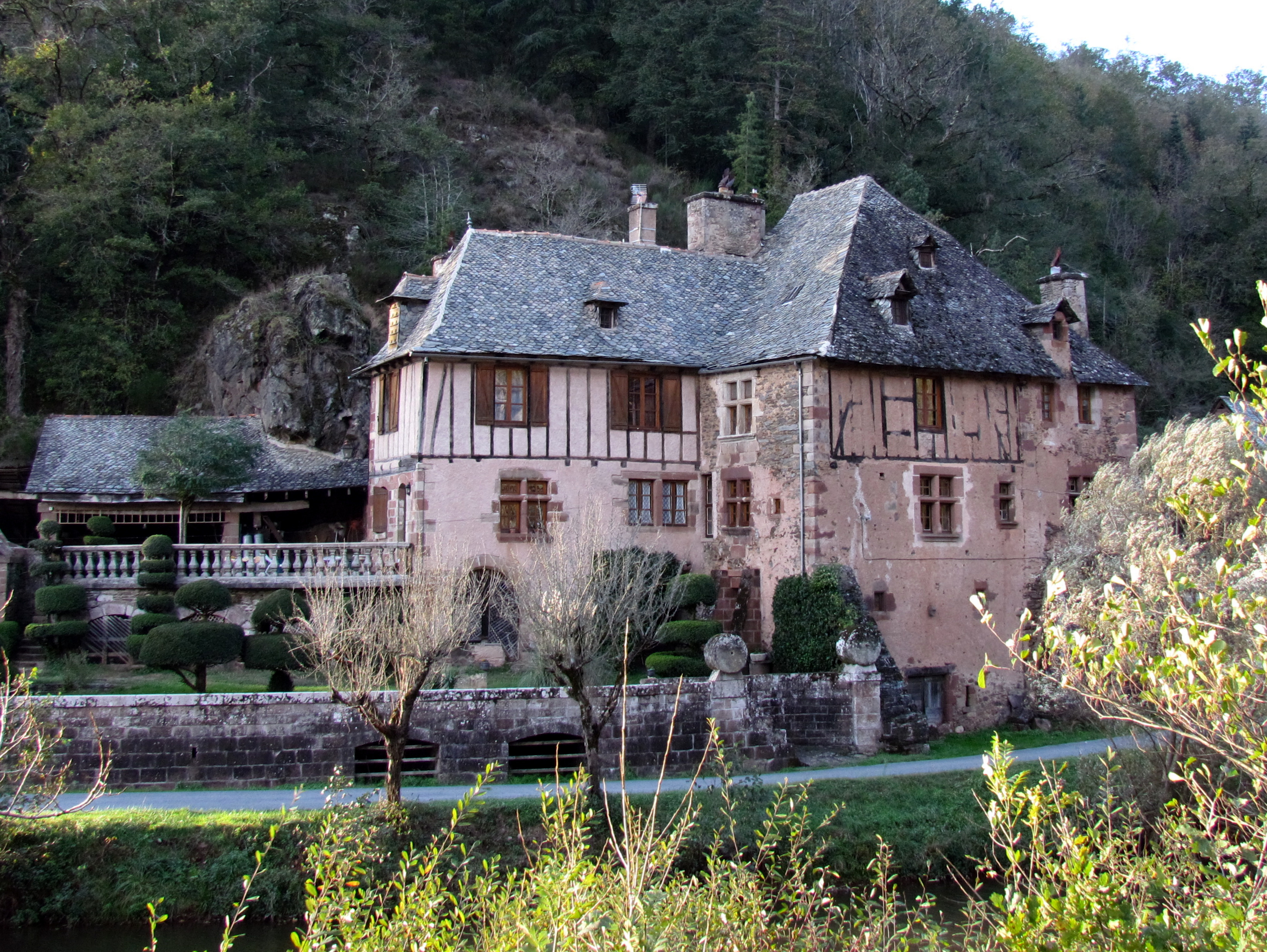 Ex-demeure des abbés de Conques sur la rive gauche du Dourdou # Aveyron (12) .